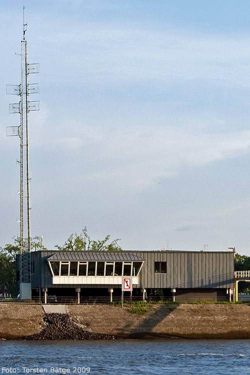 Die Nautische Zentrale auf dem Seemannshöft in Hamburg-Waltershof ist in einem in den 1970er-Jahren gebauten Flachbau untergebracht.